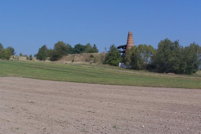 Rębielice Królewskie - piece wapienne